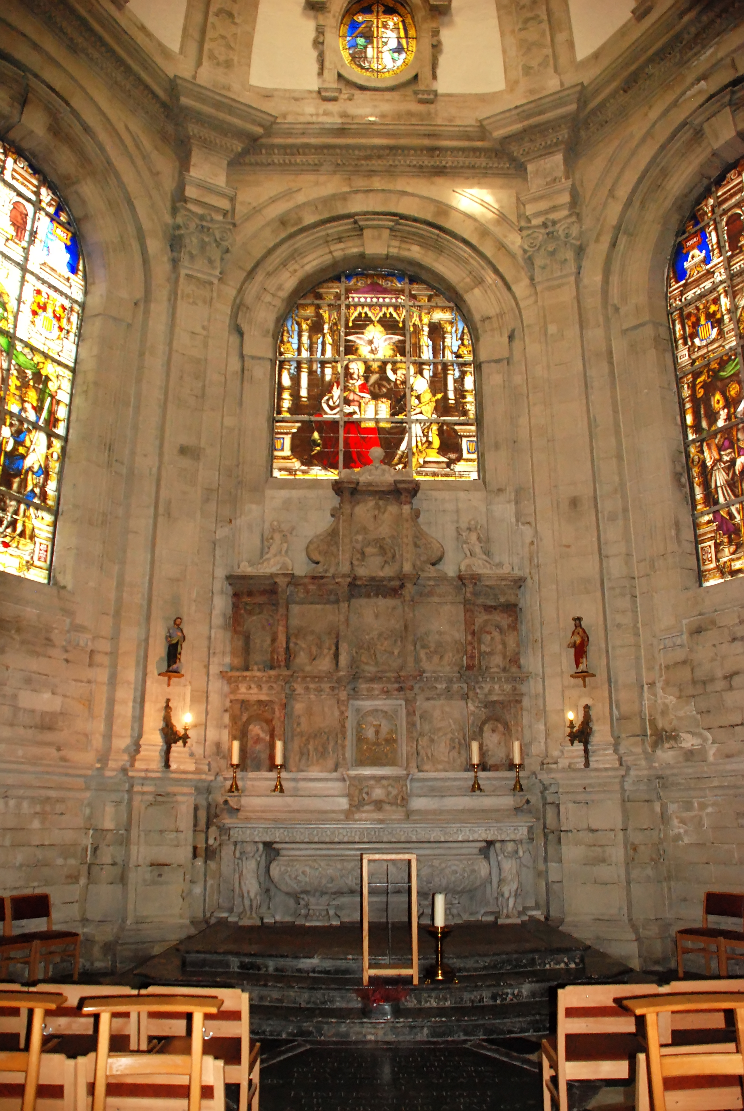 Belgique - Bruxelles - Cathédrale Saints-Michel-et-Gudule de Bruxelles - Chapelle Maes